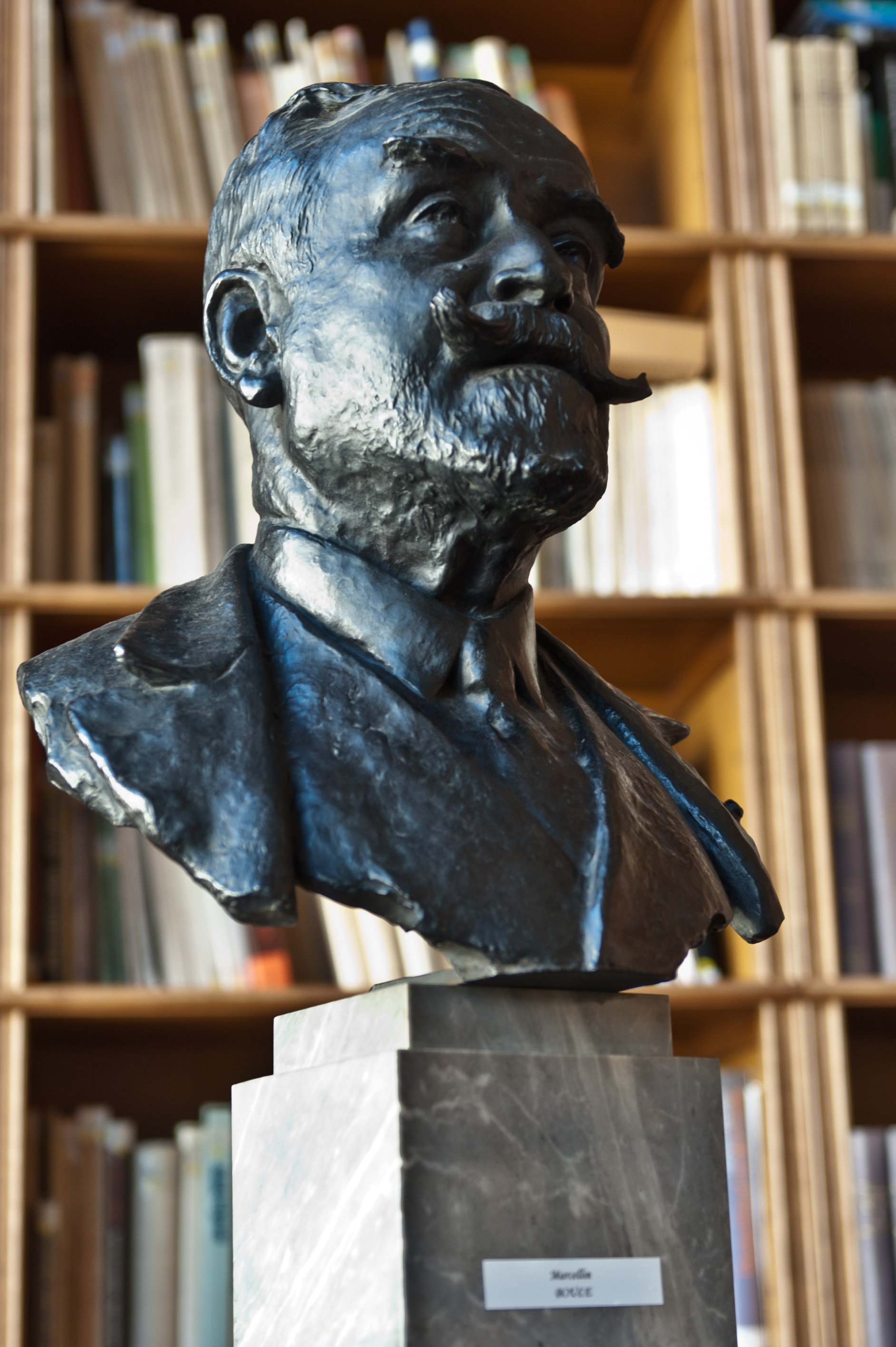 Marcellin Boule Anthropologue